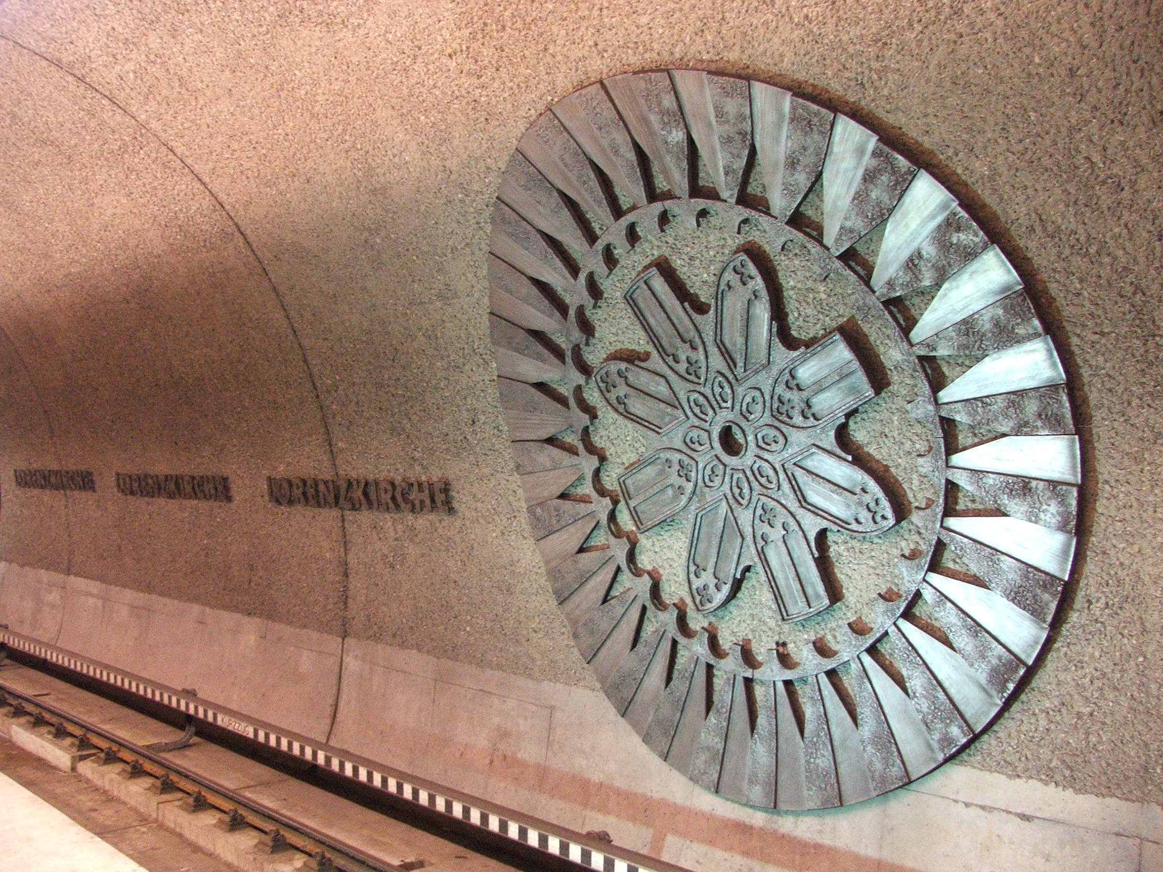 Nachbildung der Rosette von der Westfassade der Lorenzkirche aus Gusseisen